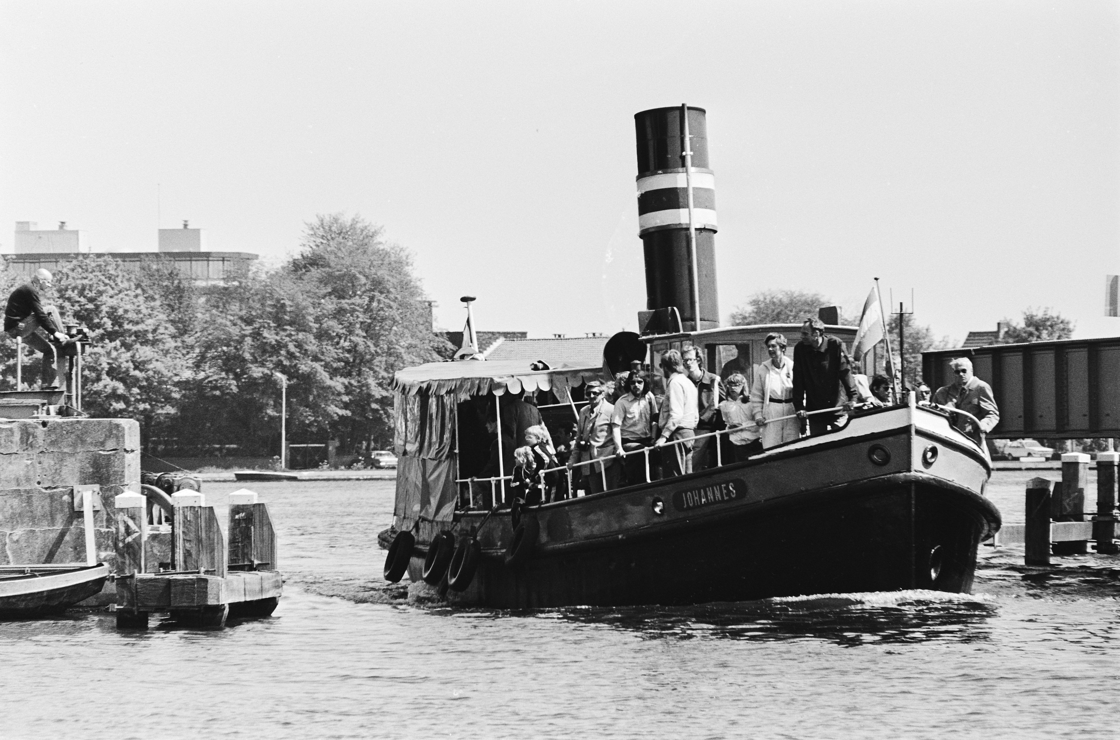 Collectie / Archief : Fotocollectie Anefo Reportage / Serie : [ onbekend ] Beschrijving : Stoomboot de Johannes in het kader "Vervoers Spektakel Amstelland" Datum : 15 mei 1980 Trefwoorden : stoomboten Persoonsnaam : Johannes Fotograaf : Dijk, Hans van / Anefo Auteursrechthebbende : Nationaal Archief Materiaalsoort : Negatief (zwart/wit) Nummer archiefinventaris : bekijk toegang 2.24.01.05 Bestanddeelnummer : 930-8278